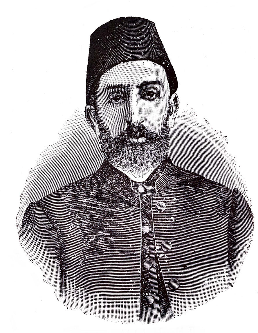 رسم لِلسُلطان عبد الحميد الثاني.